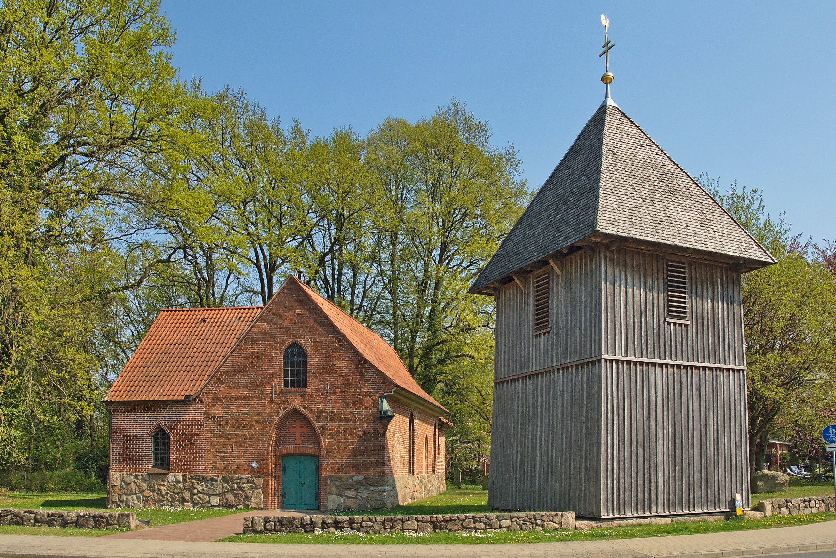 Heilig-Geist-Kirche in Wolterdingen (Soltau), Niedersachsen, Deutschland